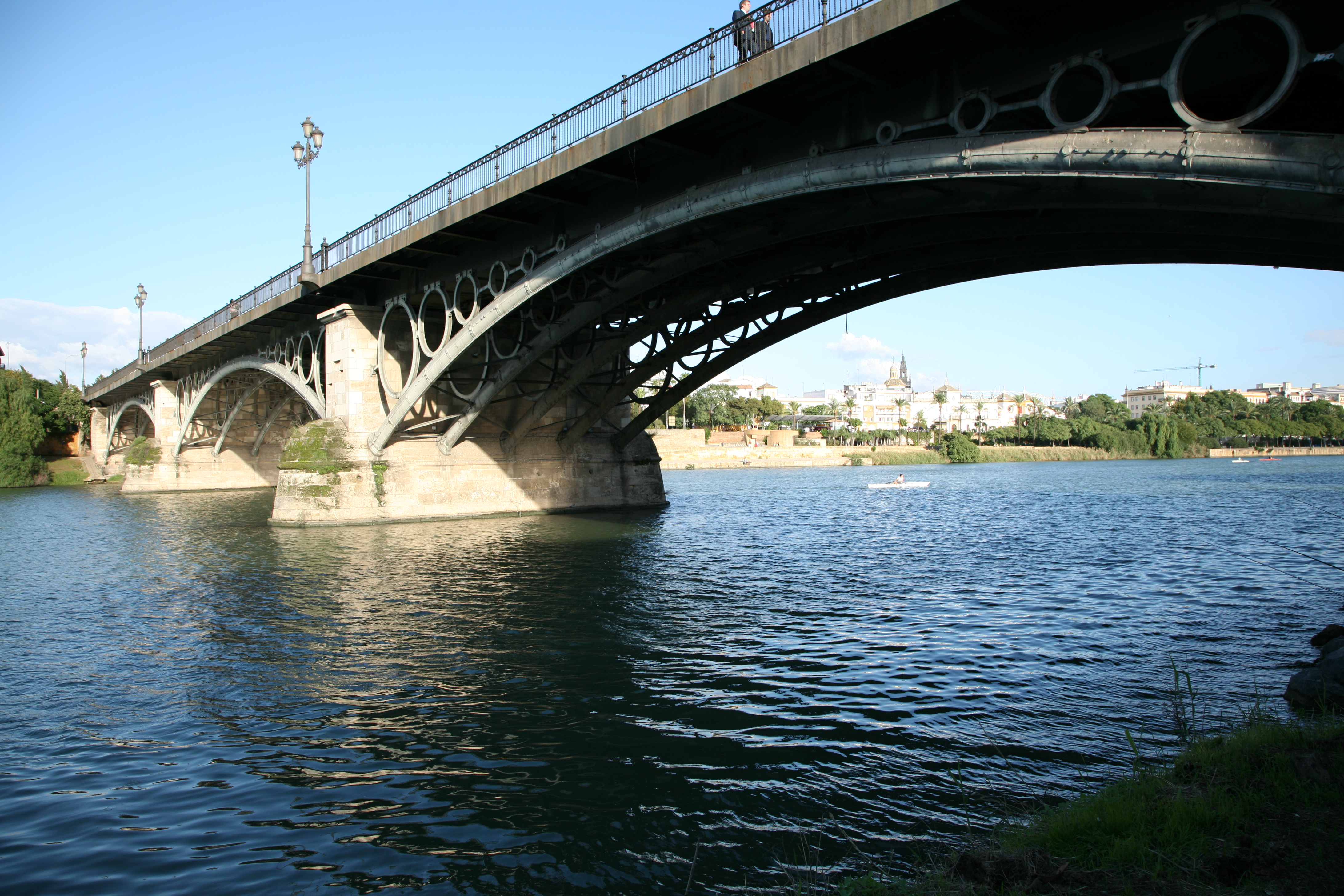 Puente de Isabel II o de Triana, Triana - Sevilla (España).